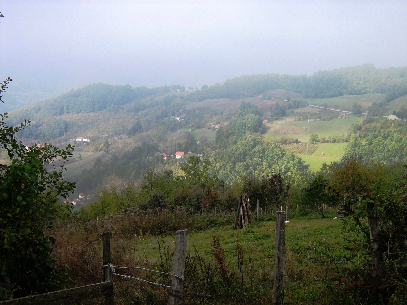 Годечево, Косјерић.